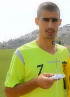 עמית בן שושן במדי בית"ר ירושלים